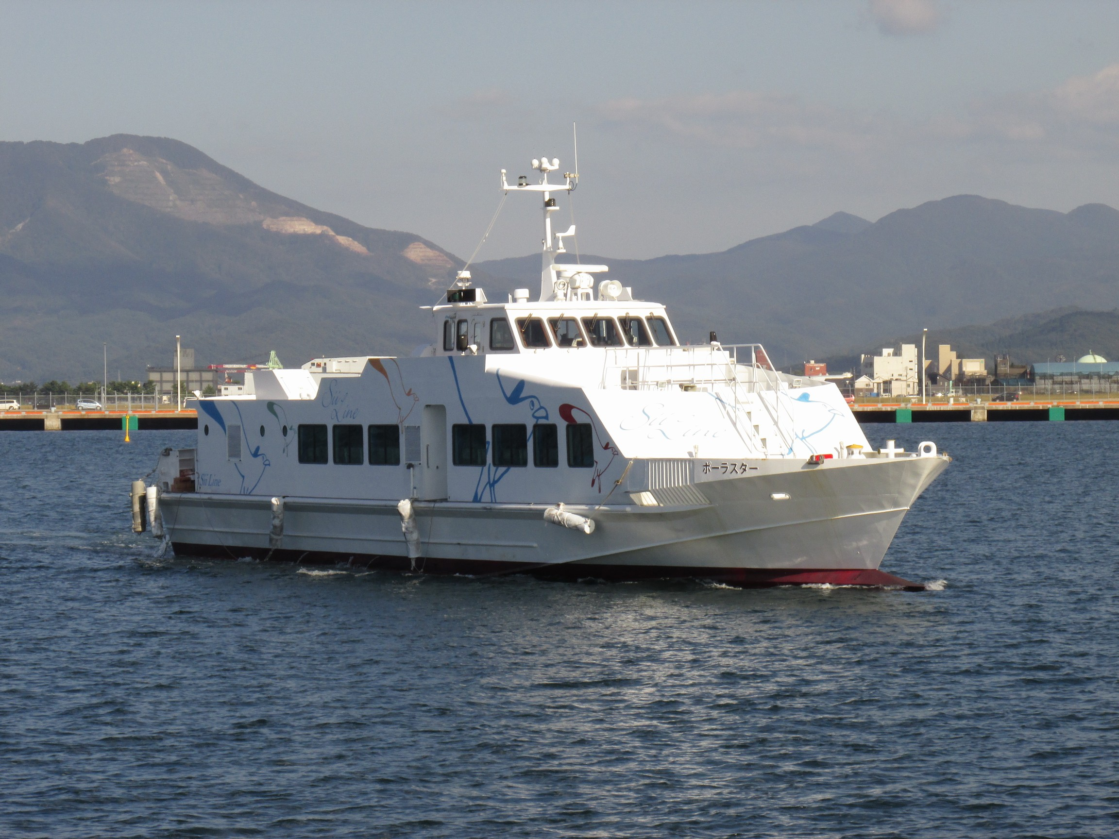 日本国,青森県青森市と下北半島を結ぶ高速船,シイラインのポーラスター。